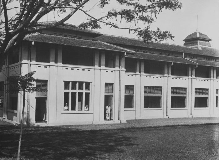 foto. Patiënten bij de ziekeninrichting van de Koninklijke Paketvaart Maatschappij te Weltevreden